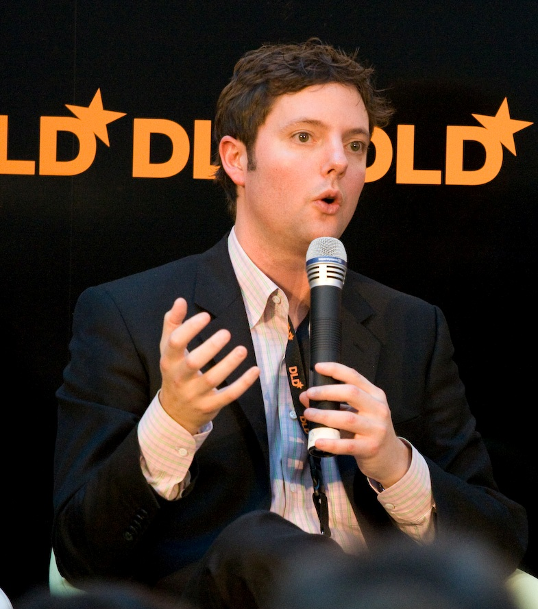 Matt Cohler